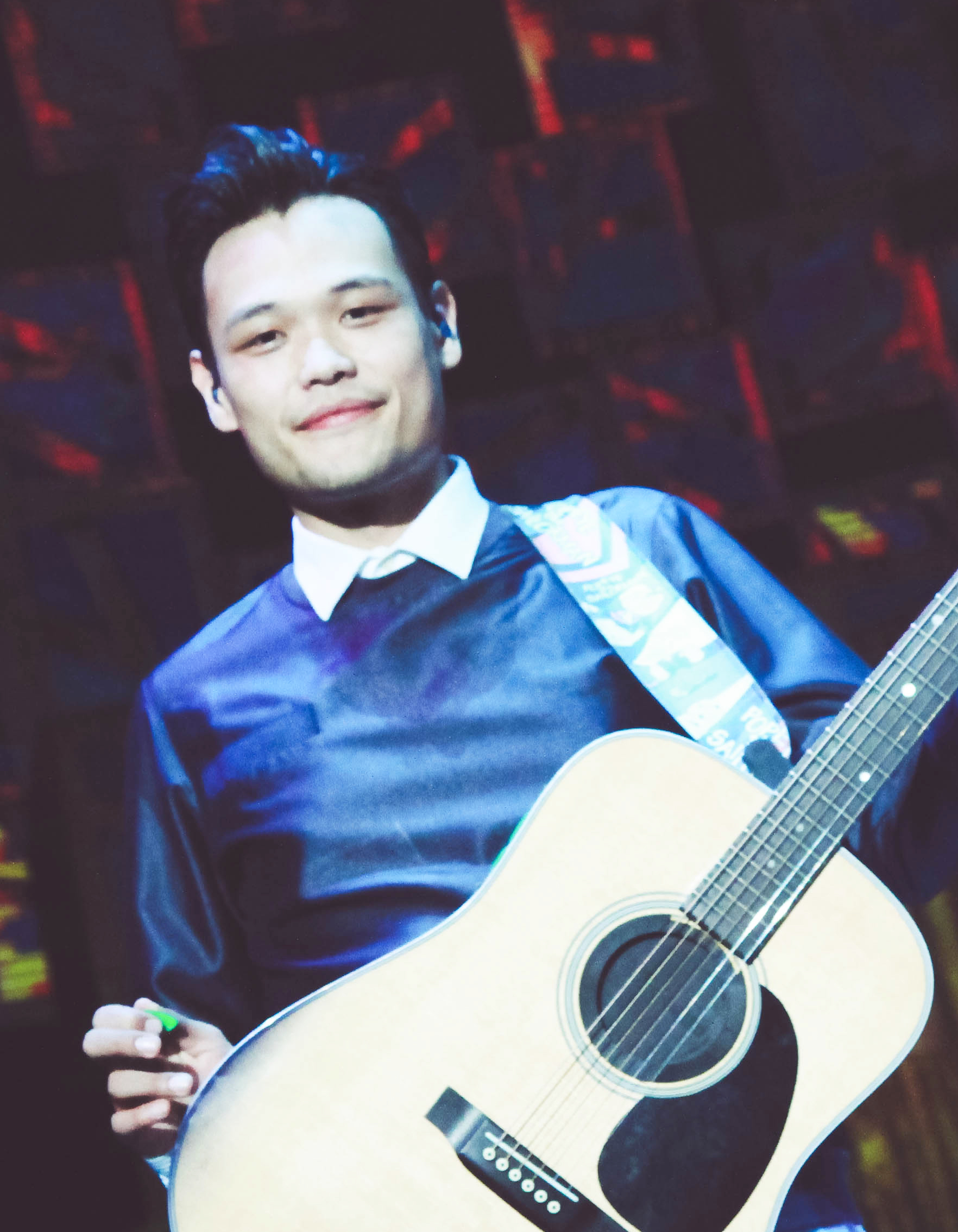 中文（中国大陆）: 2014年苏打绿10周年空气中的视听与幻觉世界巡回演唱会-新加坡站